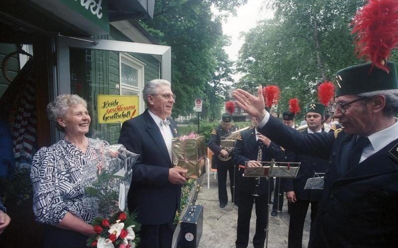 Juni 1988 Clausthal-Zellerfeld, Goldene Hochzeit, Familienfeier nach altem bergmännischem Brauch